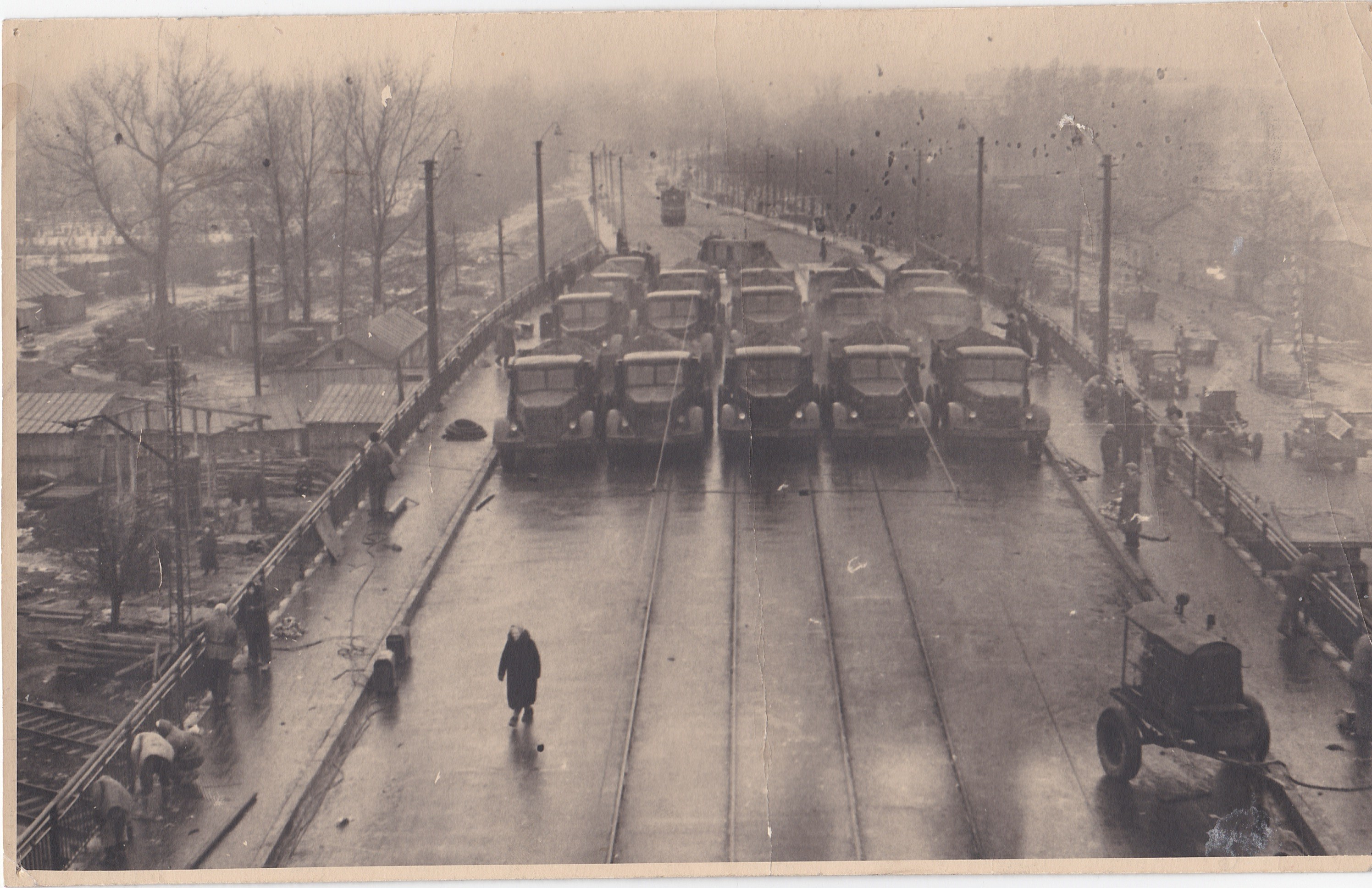 Испытание моста Брасы под нагрузкой. Декабрь 1958г.